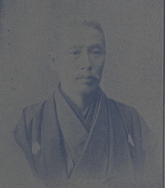 毛利重輔男爵（1848～1901）